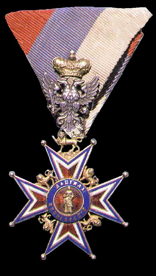 Scan van kruis uit mijn verzameling. Iets minder zwart dan in de vorige upload ( sorry!)